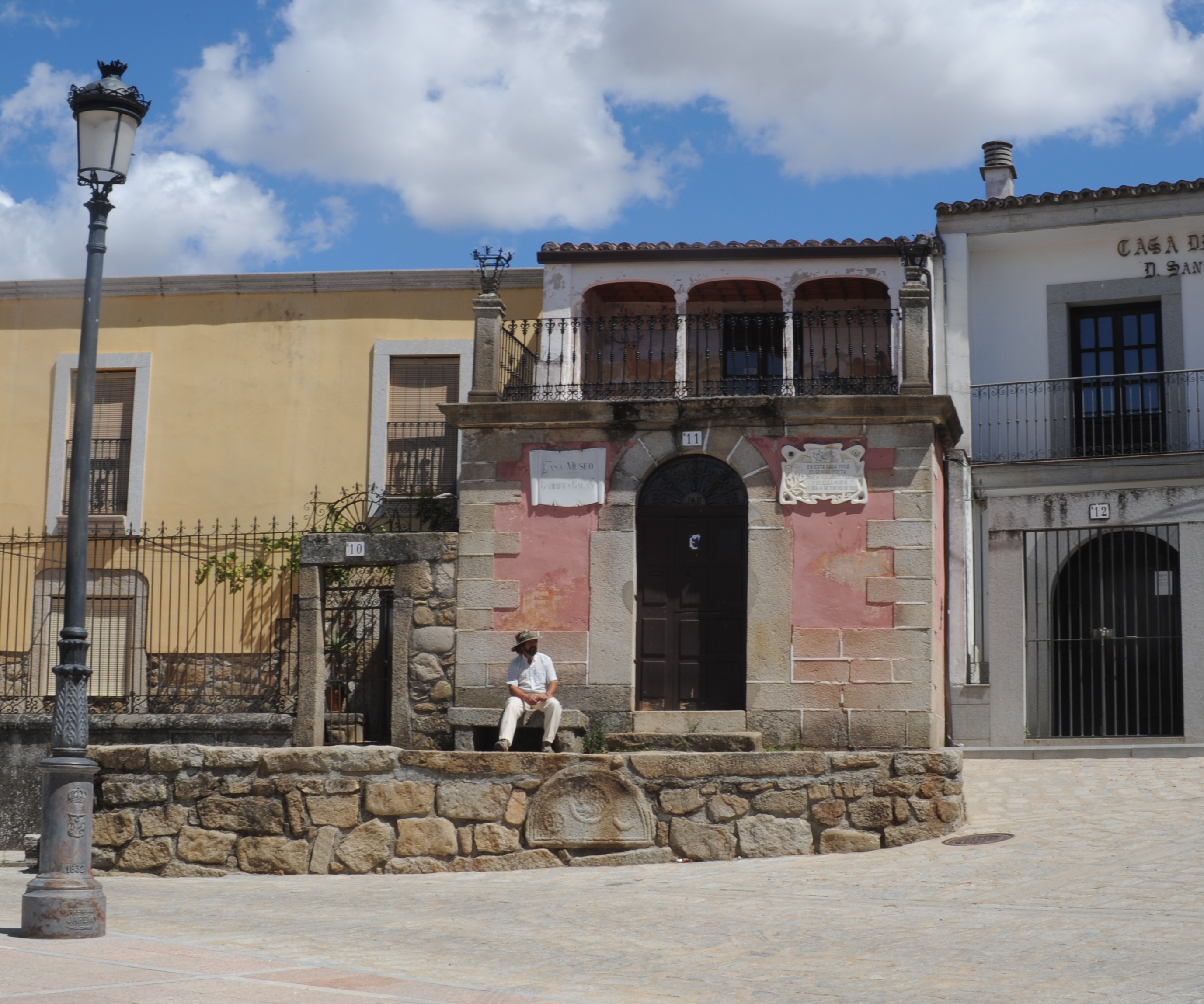 Fotografía de la casa en la que nació el escritor extremeño Gabriel y Galán